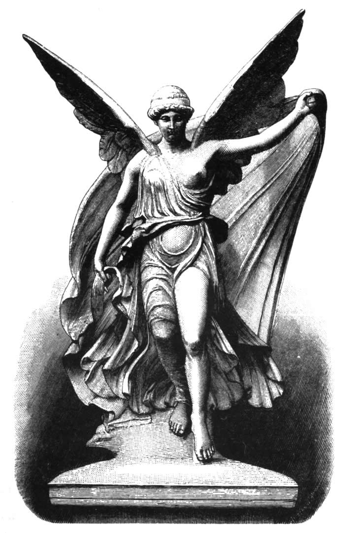 Nike